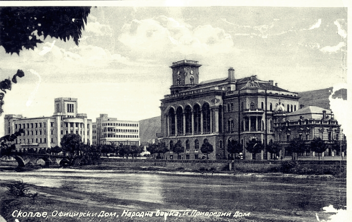 Офицерски Дом -Скопје, Македонија пред 1963 I